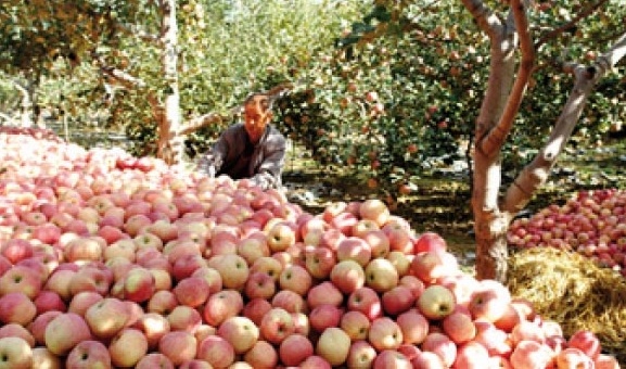 Gala Royal